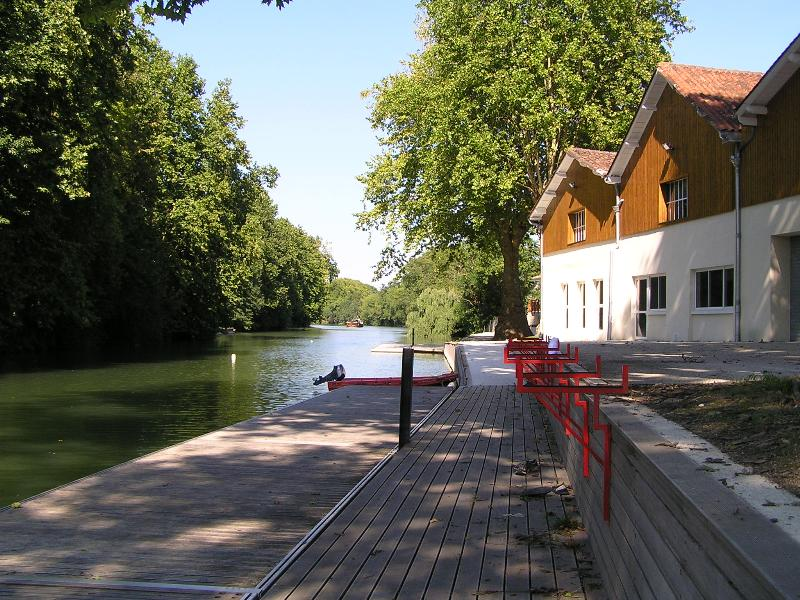 CYRC, club d'aviron de Cognac, Charente, France